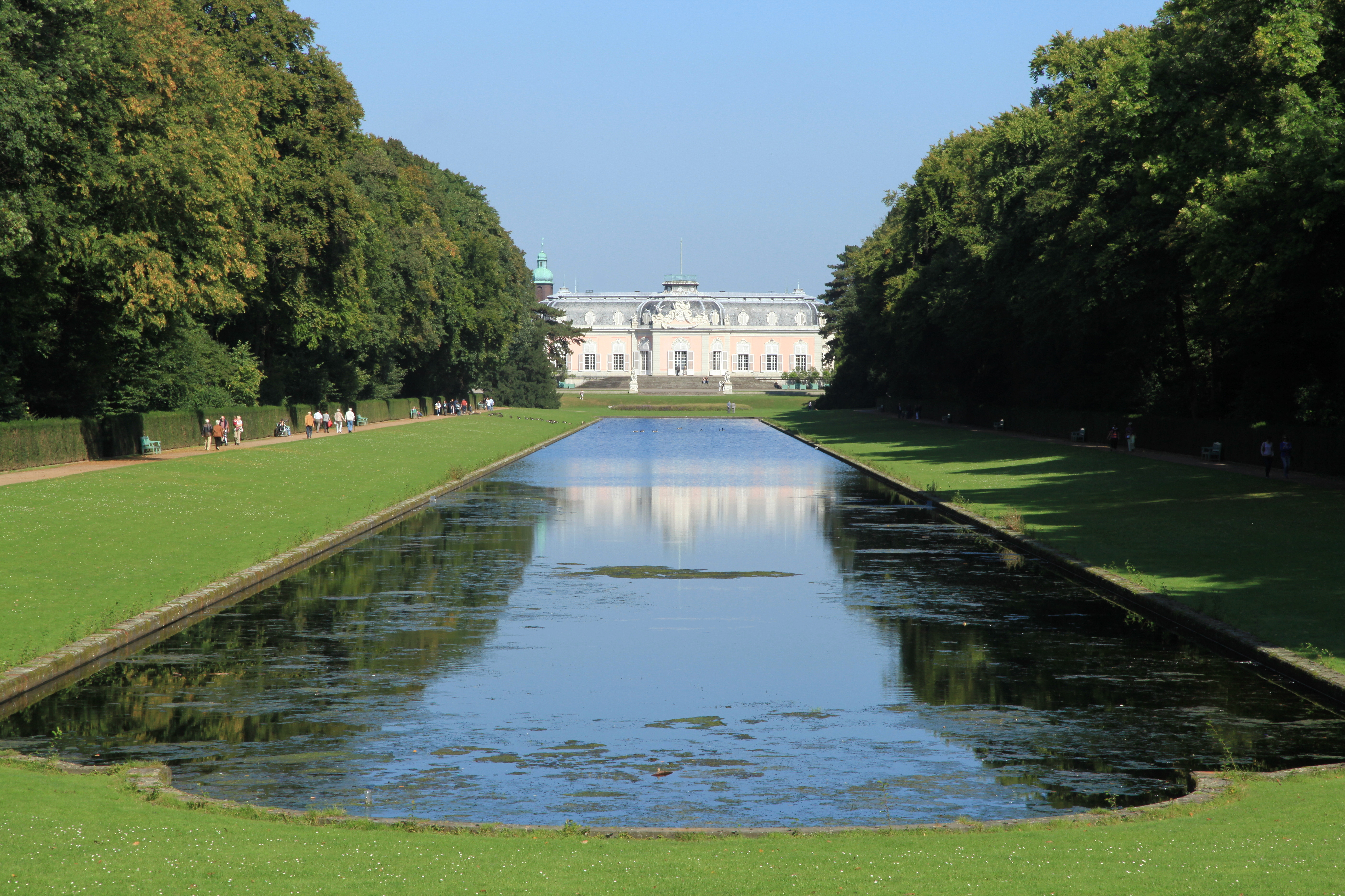 Spiegelweiher und Corps de Logis im Schlosspark Benrath in Düsseldorf